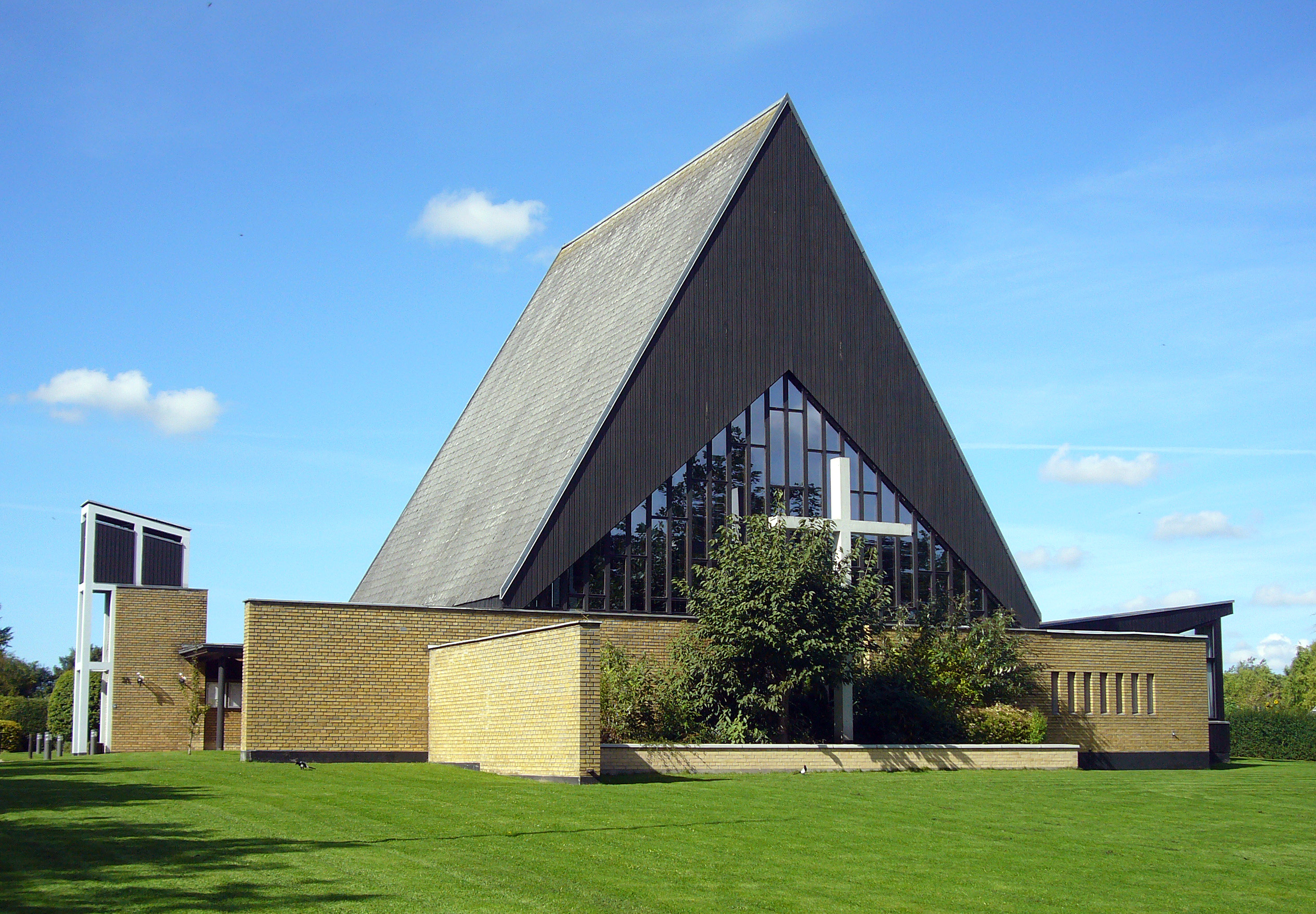 Husumvold Kirke, Copenhagen, Denmark. Husumvold Kirke